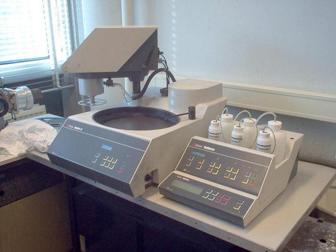 Zelfgemaakte foto vanochtend, van de schuur- en polijstmachine bij Materiaalkunde, voor in het artikel schuren (techniek)